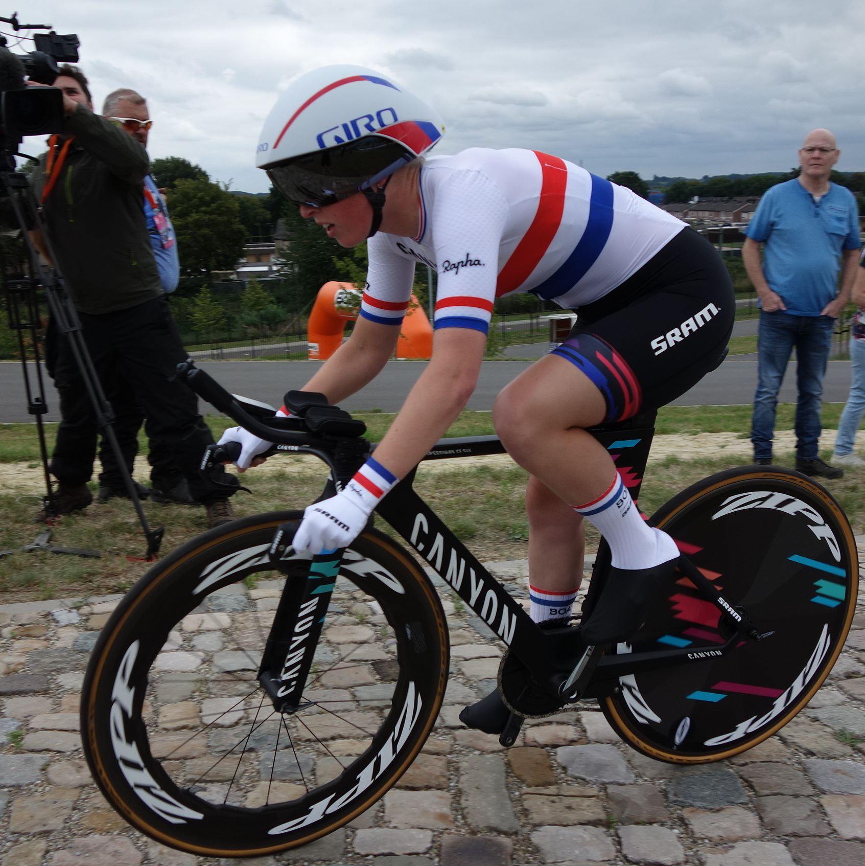 Alice Barnes (Canyon-SRAM) bij de proloog op het Tom Dumoulin Bike Park in Sittard in de Boels Ladies Tour 2019